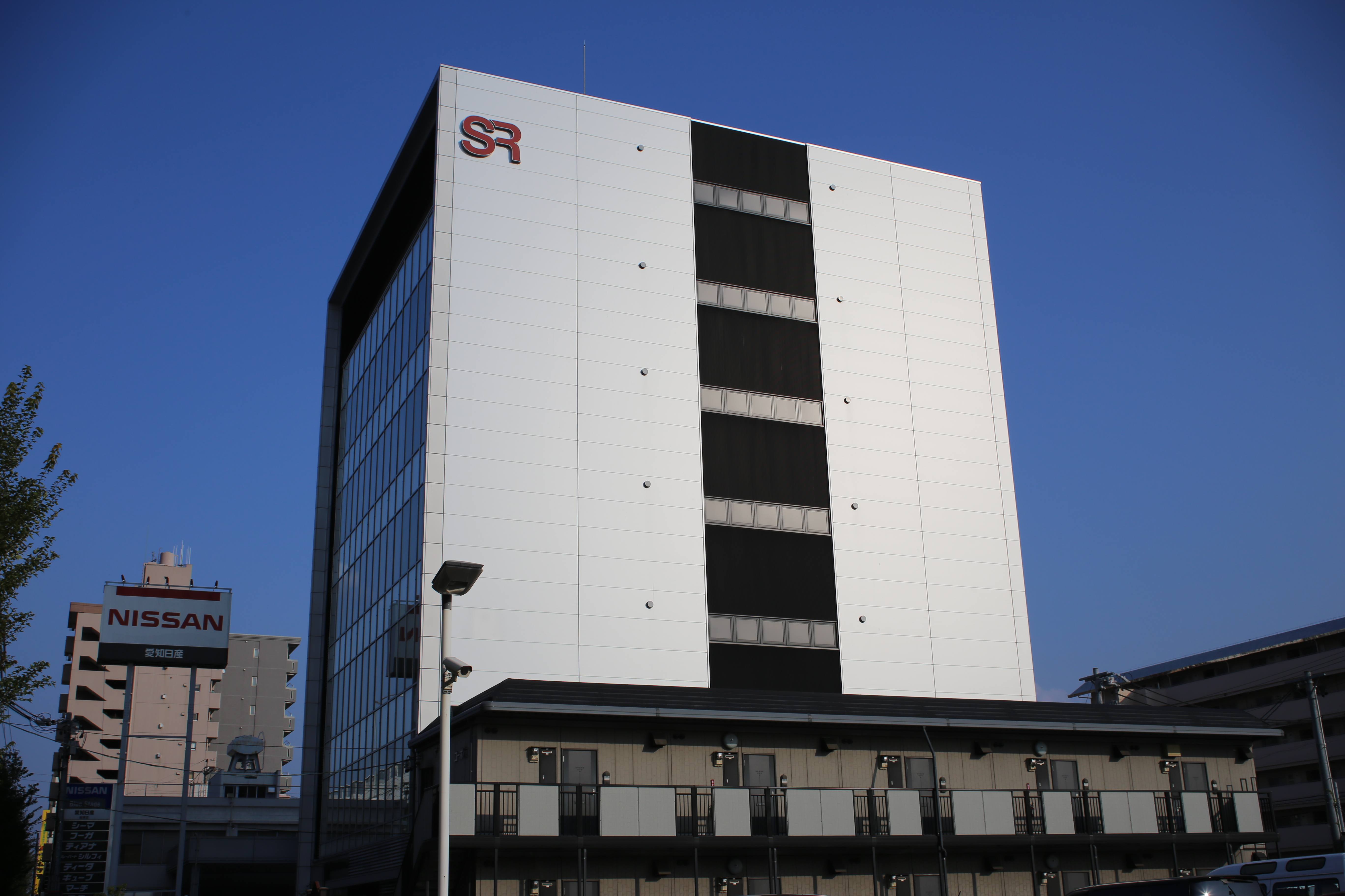 名古屋市中村区岩塚本通二丁目のシステムリサーチ本社を北側公道西側より撮影